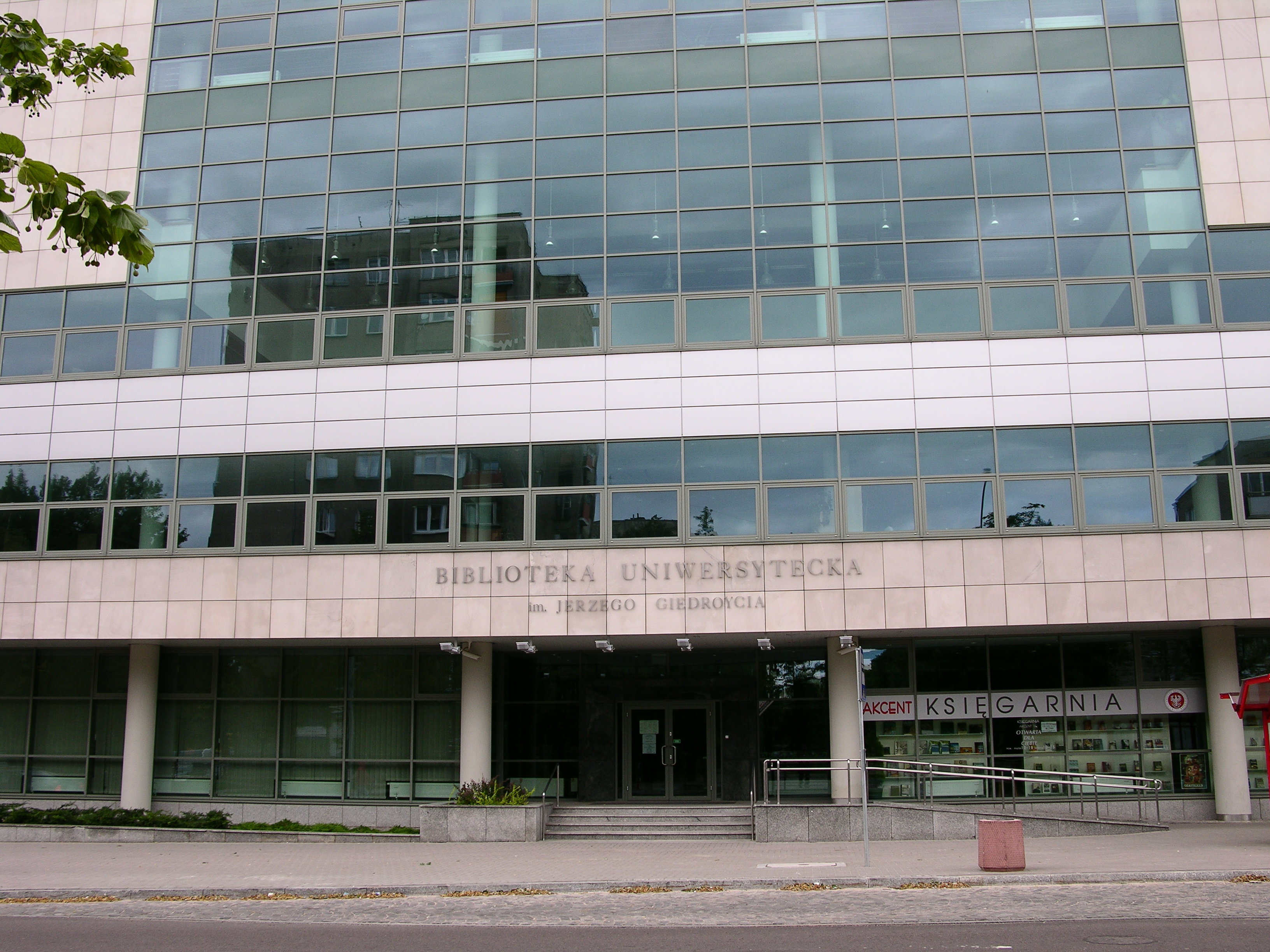 Książnica Podlaska im. Ł.Górnickiego